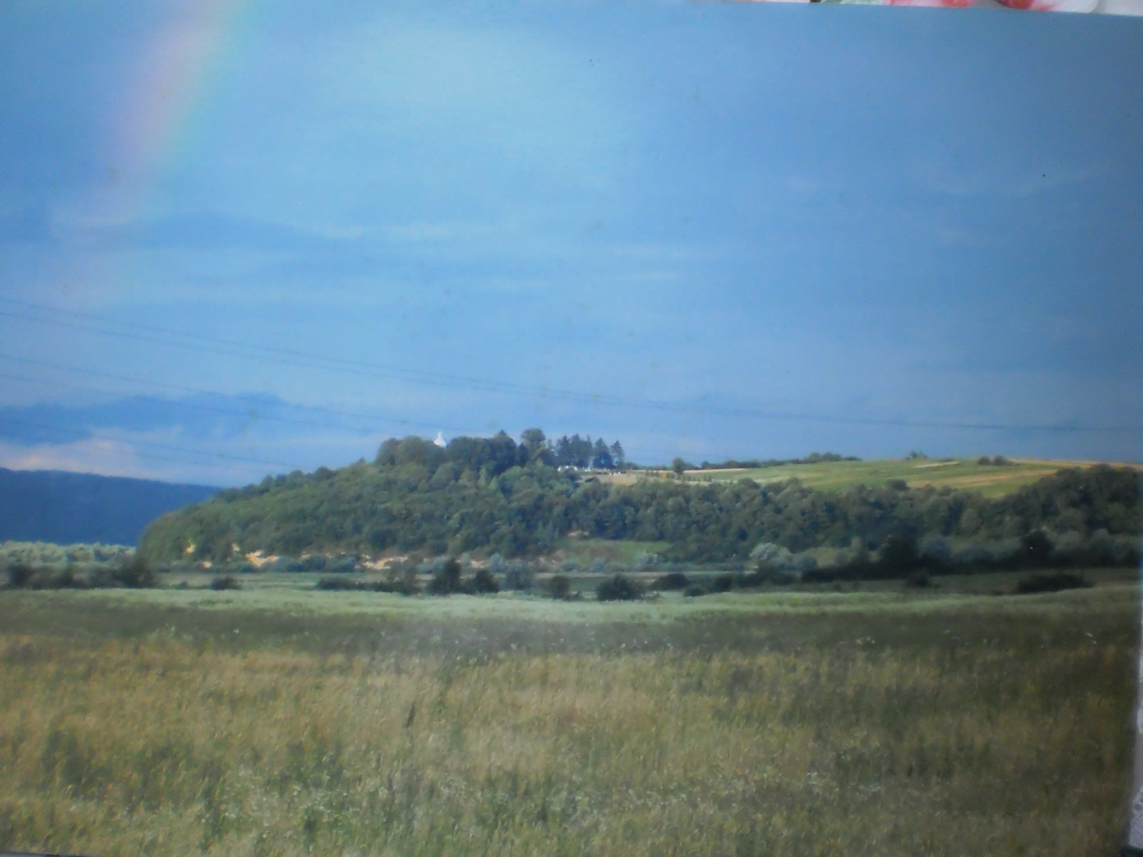 Фото №5. Церква на Горі. с. Старе Село. 2001р